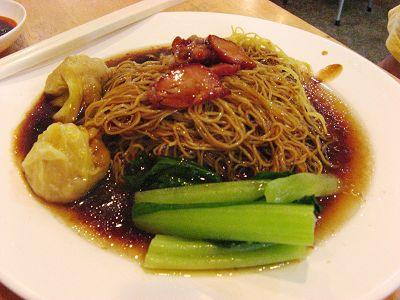 雲吞麵,可分為兩種：乾的吃法和湯的吃法。擁有獨特的麵條搭配獨特的黑色醬汁。會搭配幾片叉燒，當然一定不能少了雲吞。雲吞又可以分成兩種，一個是炸的一個是沒有炸的。